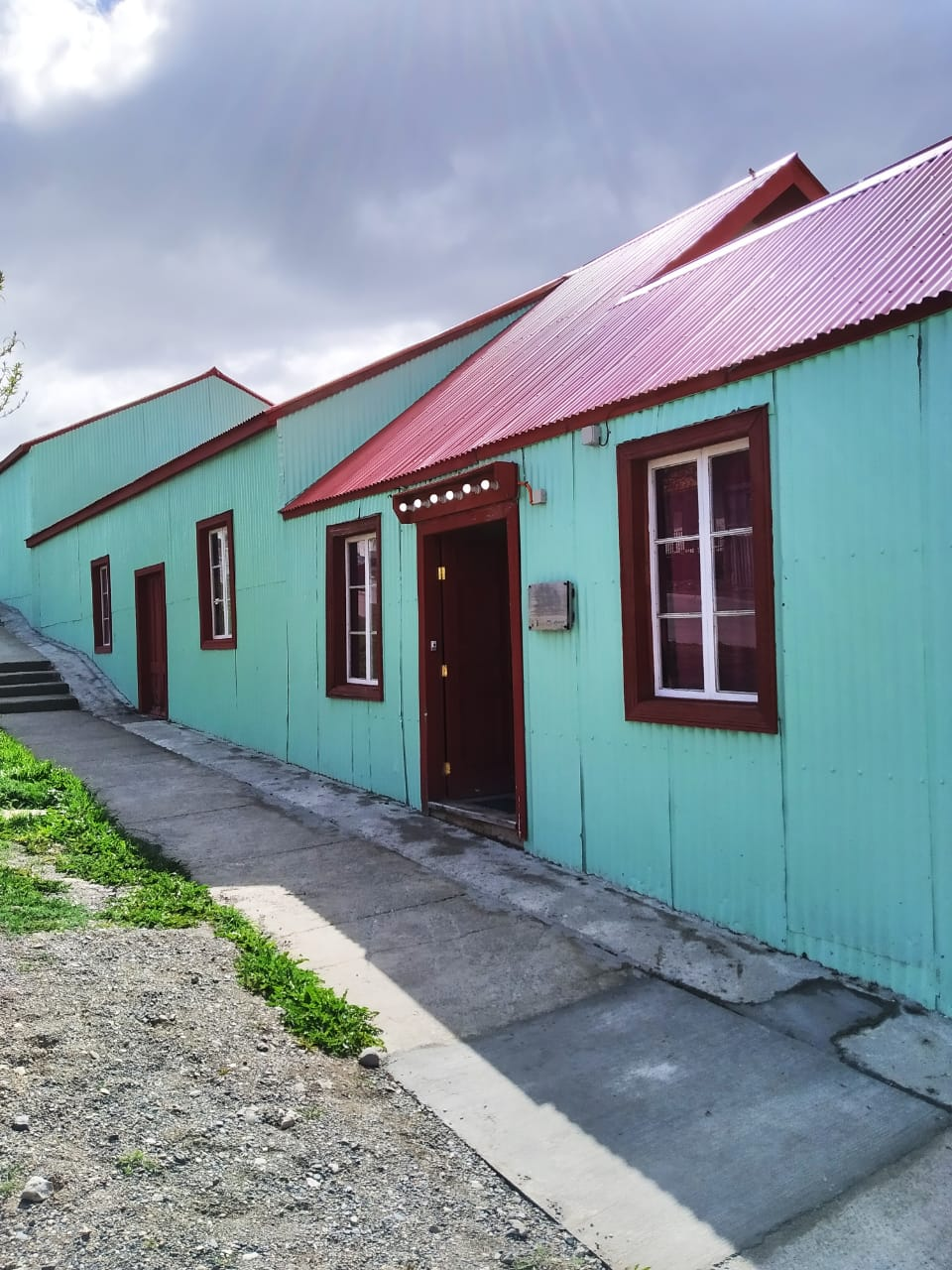 Fotografia de el Teatro Cinema Porvenir